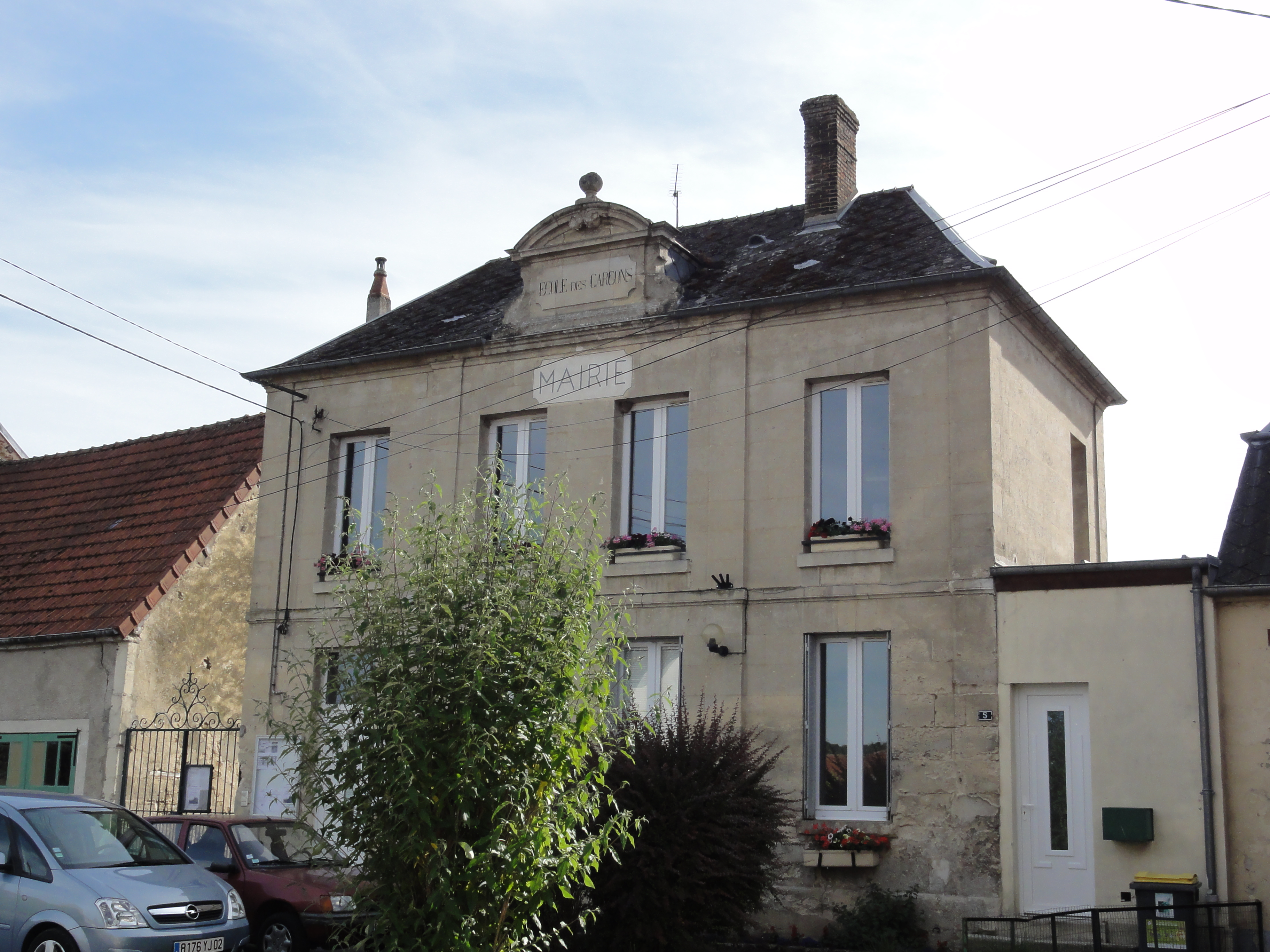 Mauregny-en-Haye (Aisne) mairie-école